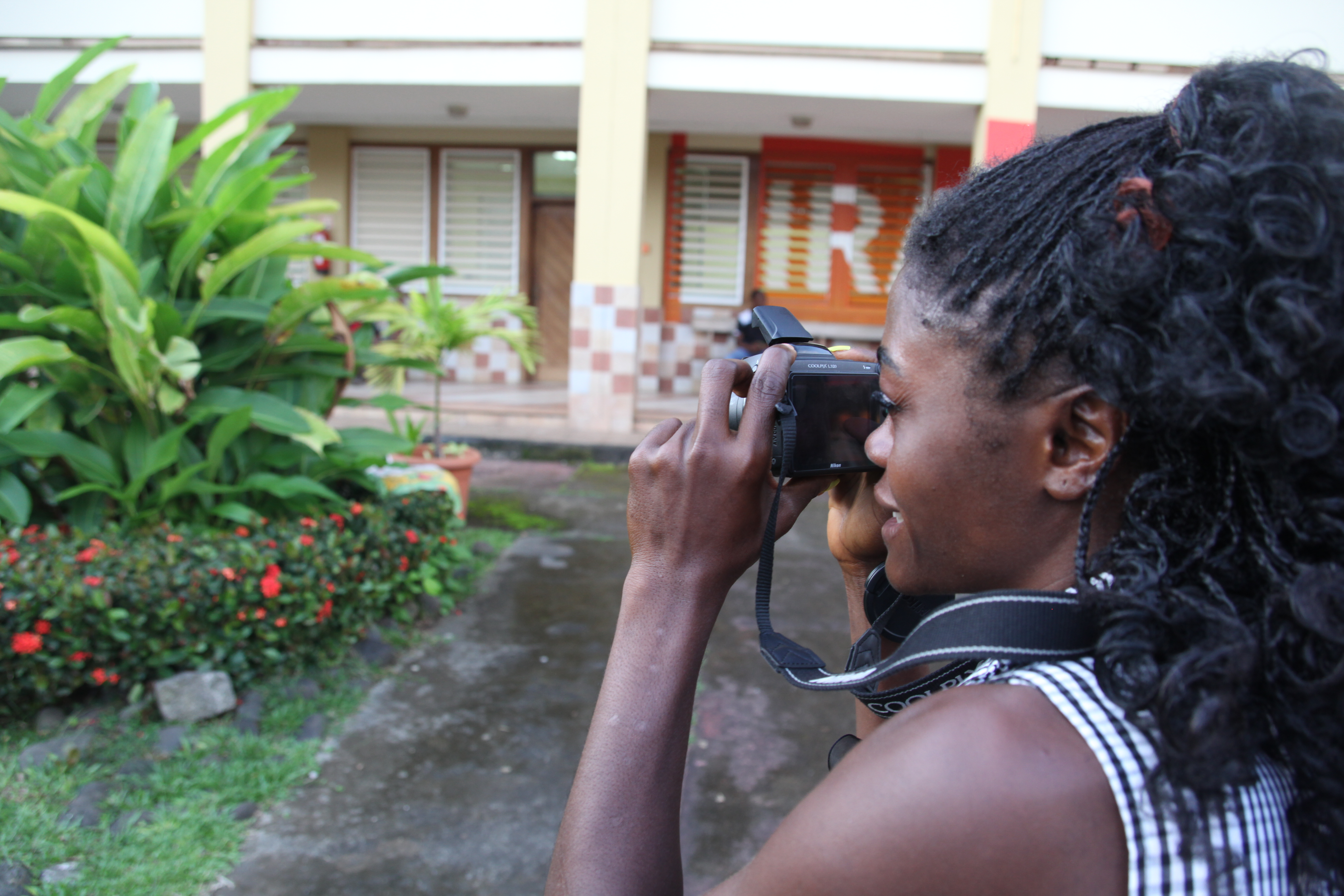 Taller de fotografía en el patio del Centro Cultural de España en Malabo. This is an image of "African people at work" from Equatorial Guinea